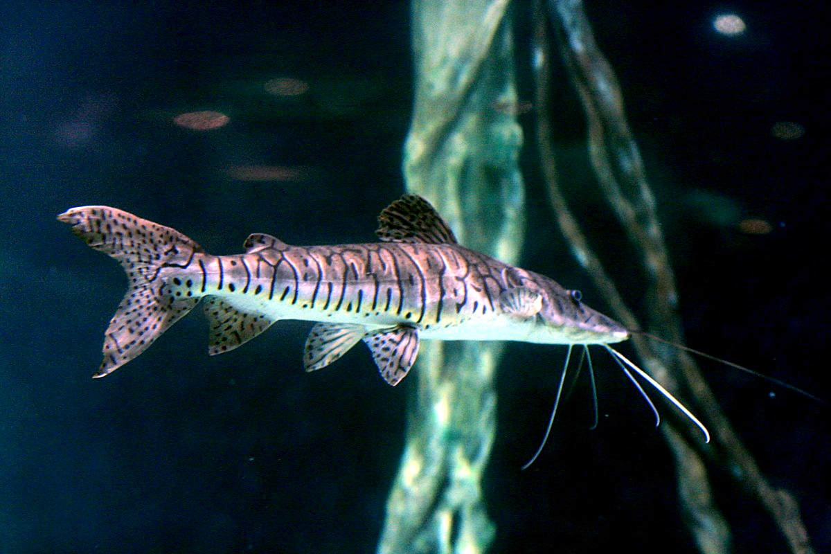 Tiger sorubim Pseudoplatystoma fasciatum